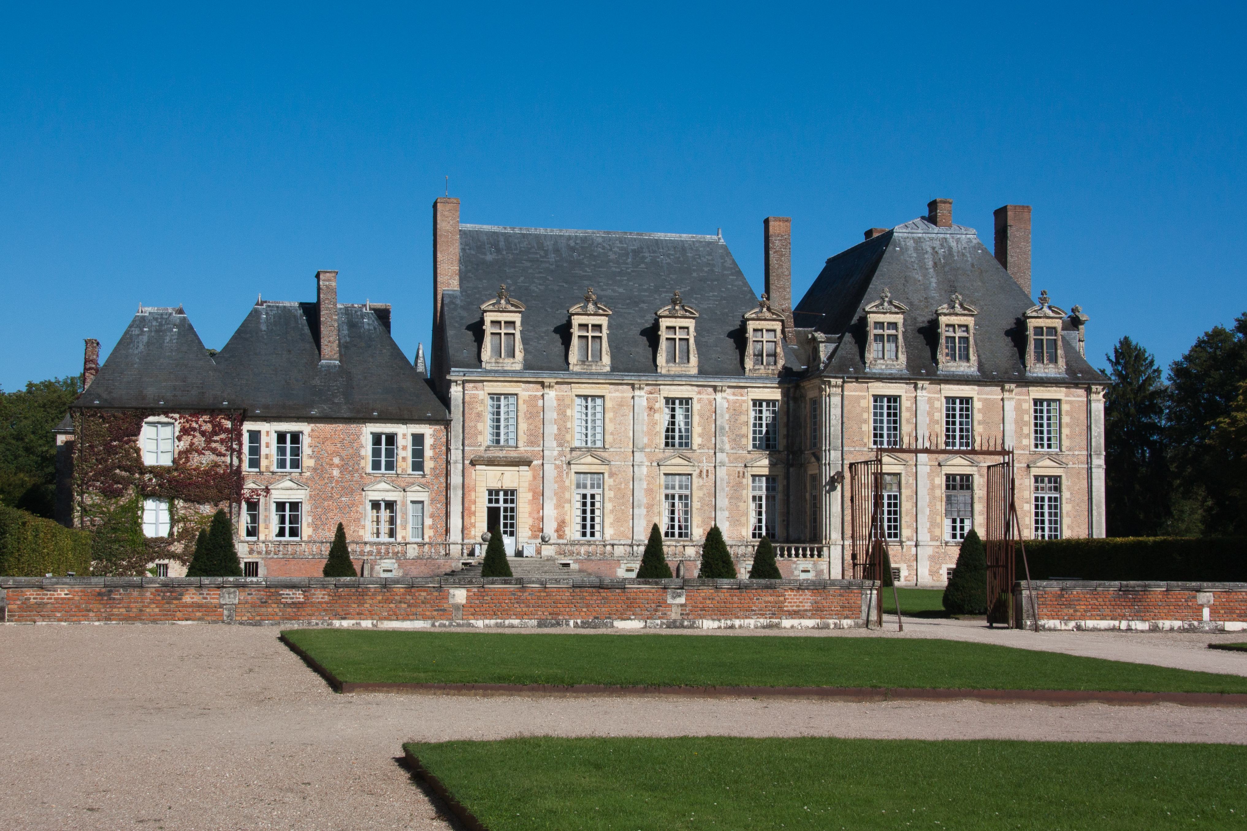 Château de la Ferté - La Ferté-Saint-Aubin, Loiret, France.